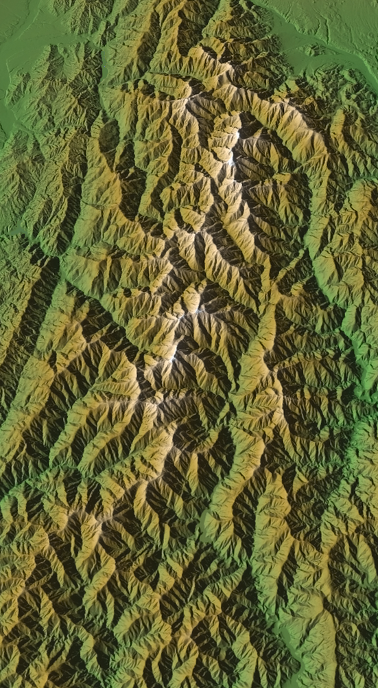 南アルプスのCG画像。カシミール3Dを使用し作成。編集。